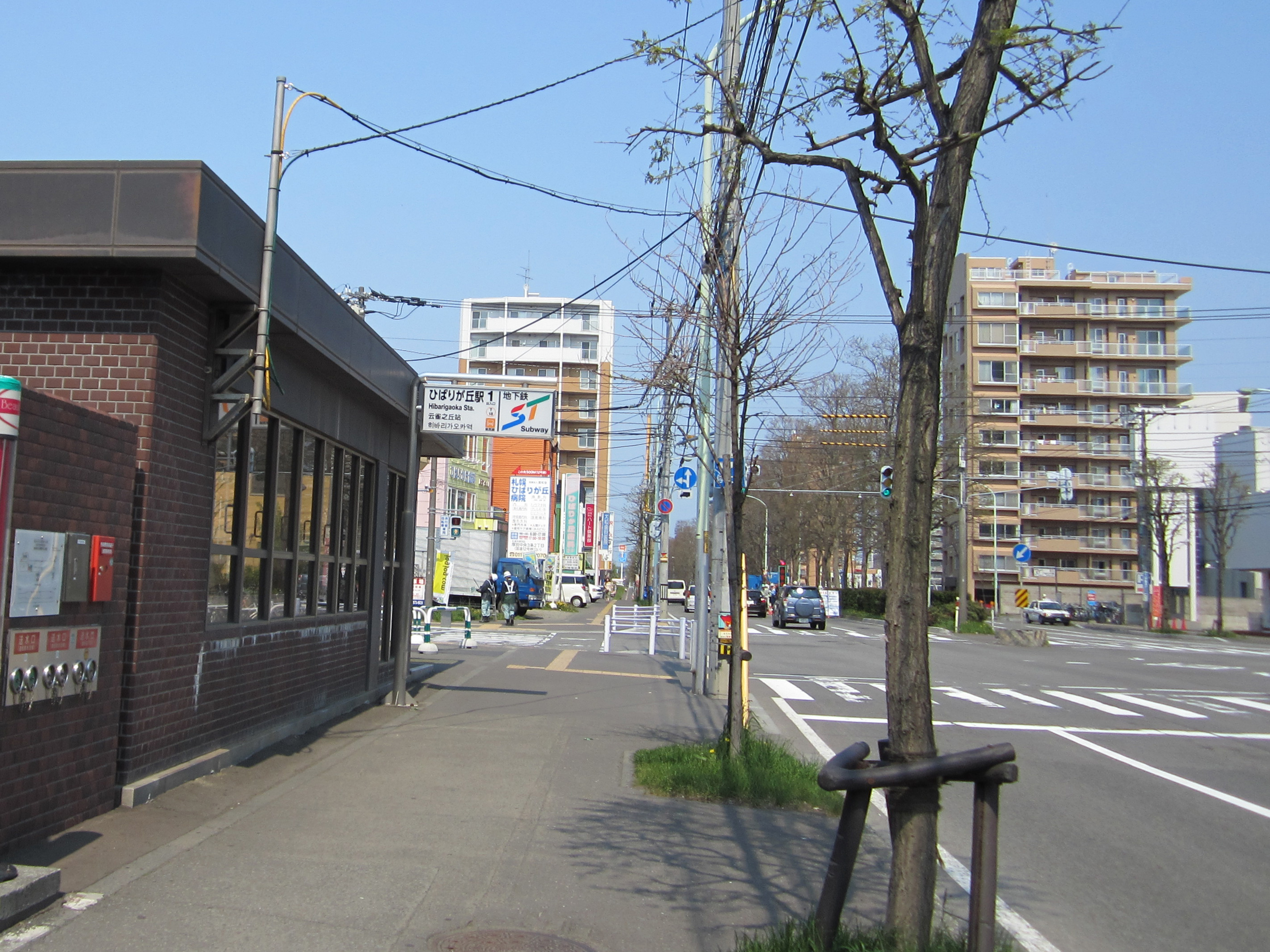 札幌市営地下鉄東西線ひばりが丘駅1番出入口